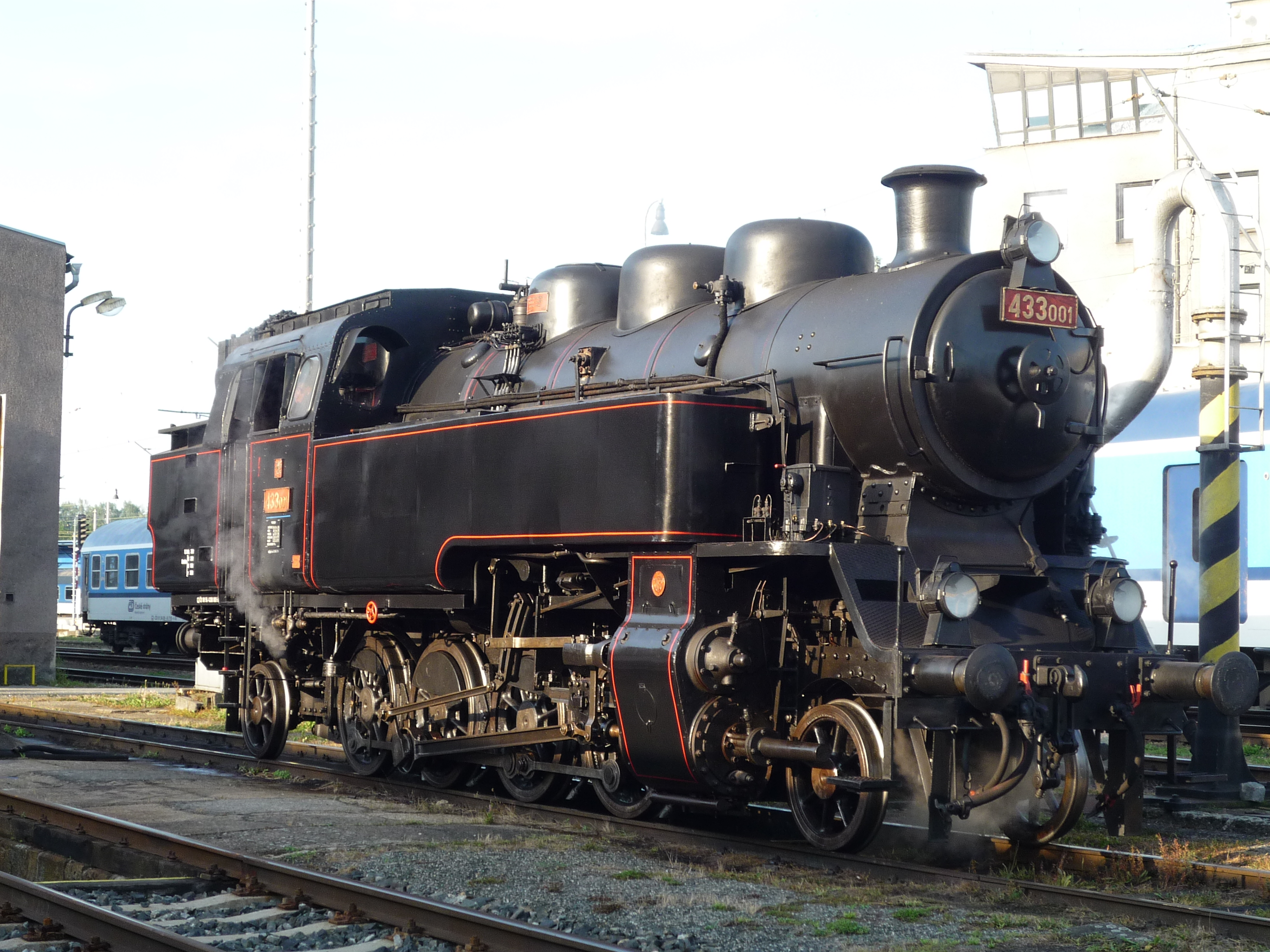 Autor fotografie Jiří Zelenka.Parní lokomotiva Skaličák (série 433.001). Článek k akci vyšel v Deníku Vysočina (Havlíčkobrodsko) pod názvem Parní vlak vjel k Perštejnu - 7.8.2017. Nádraží (DEPO) Havlíčkův Brod. Příprava stroje na slavnost Perštejnského panství. Havlíčkův Brod. Kraj Vysočina. Czech Republik.